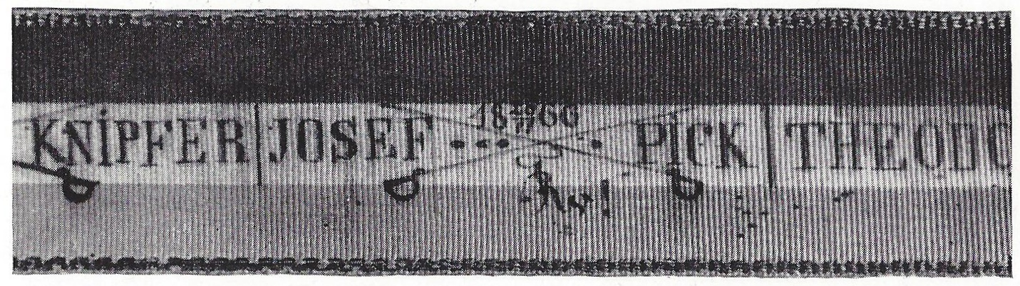 Ausschnitt aus dem Mensurband von Franz Schimann Frankoniae Prag (1864) vs. Josef Pick Rugiae Prag am 29. November 1866.